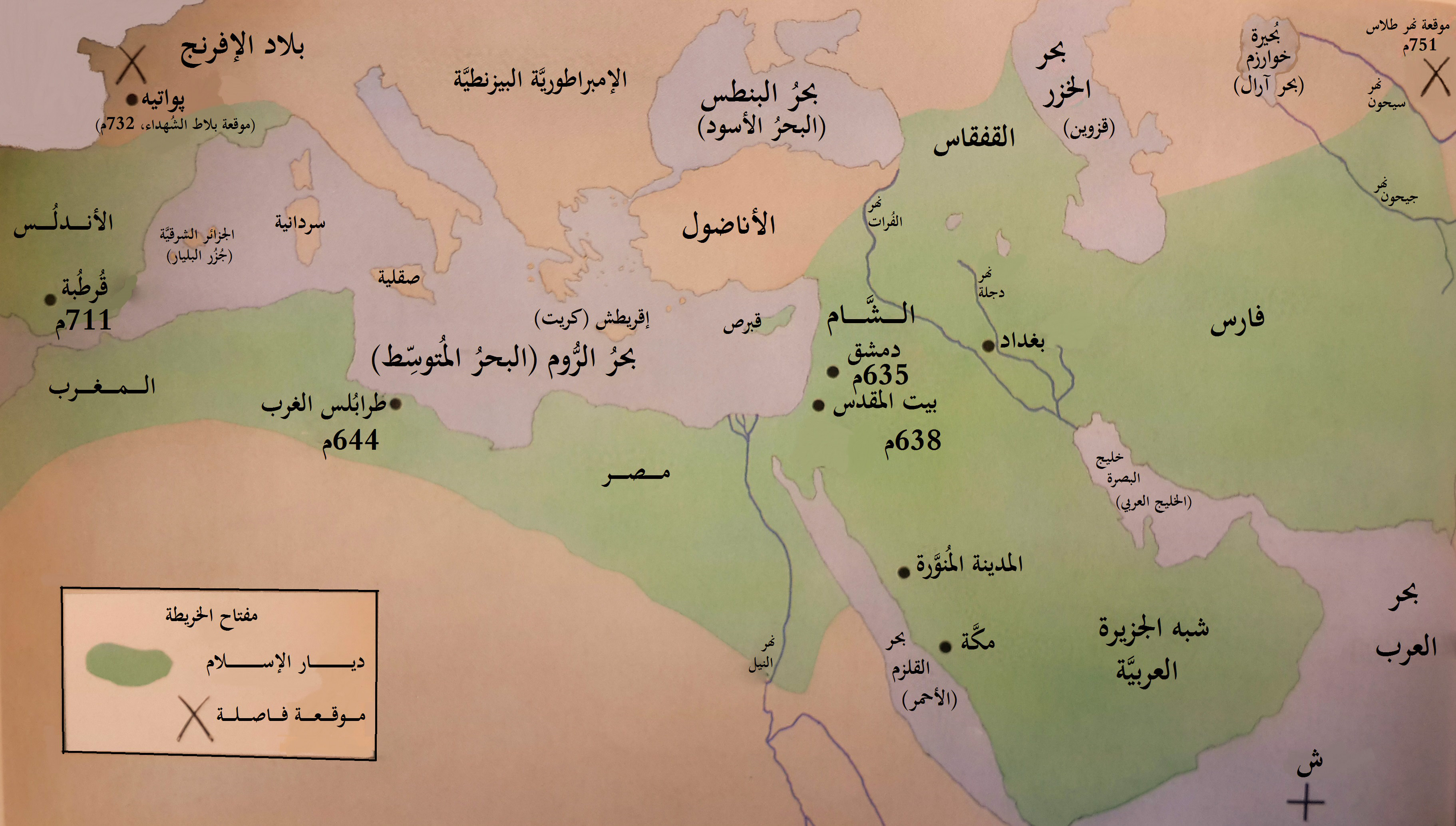 خريطة الدولتان الإسلاميَّتان: الأُمويَّة والعبَّاسيَّة وأقصى ما بلغه الإسلام من انتشار تحت رايتهما، في الشرق والغرب على حدٍ سواء.